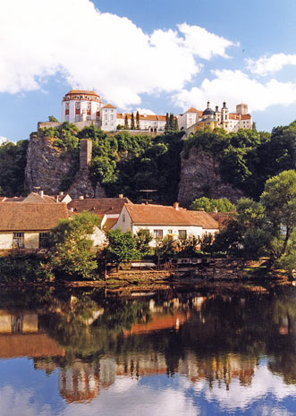 Zámek ve Vranově nad Dyjí.